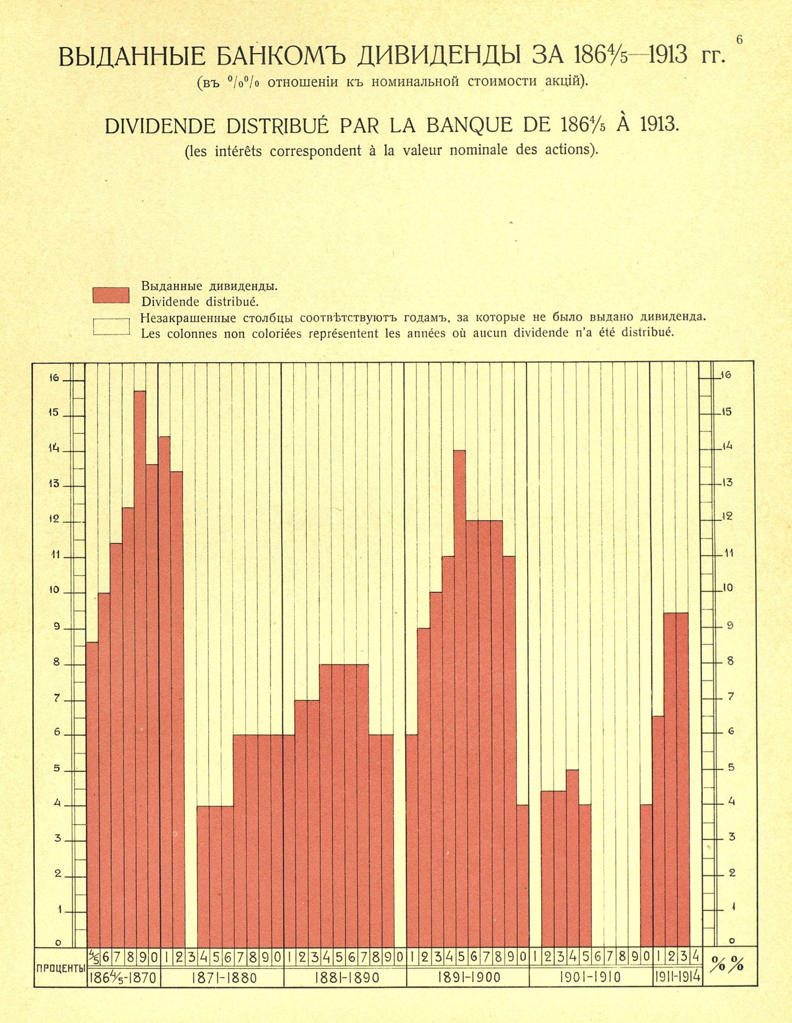 Дивиденды Санкт-Петербургского частного коммерческого банка, 1864-1914